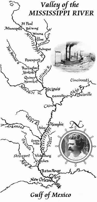 Voyage sur le Mississipi par Mark Twain en 1882